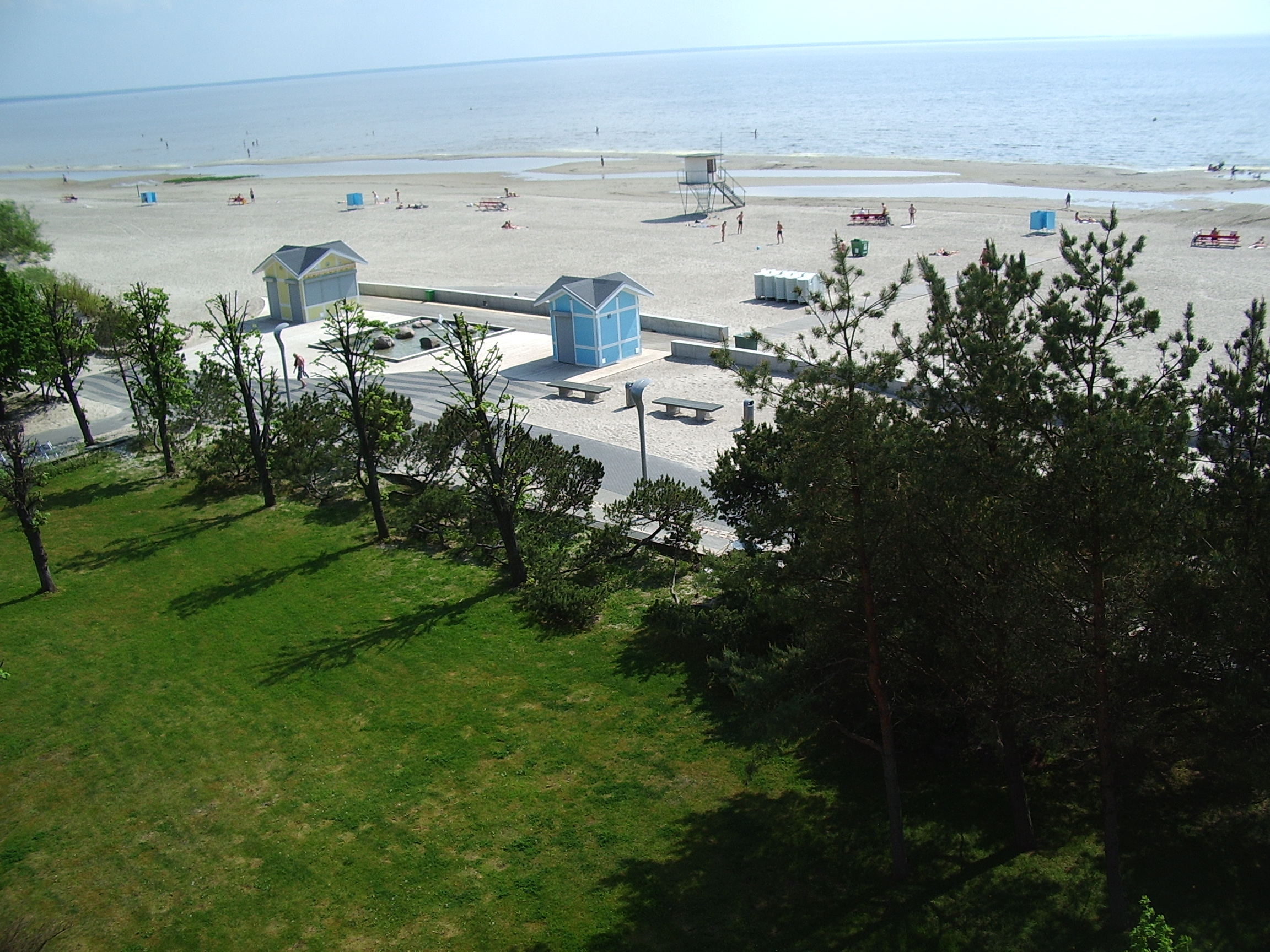 Rannapromenaad rannahotellist nähtuna